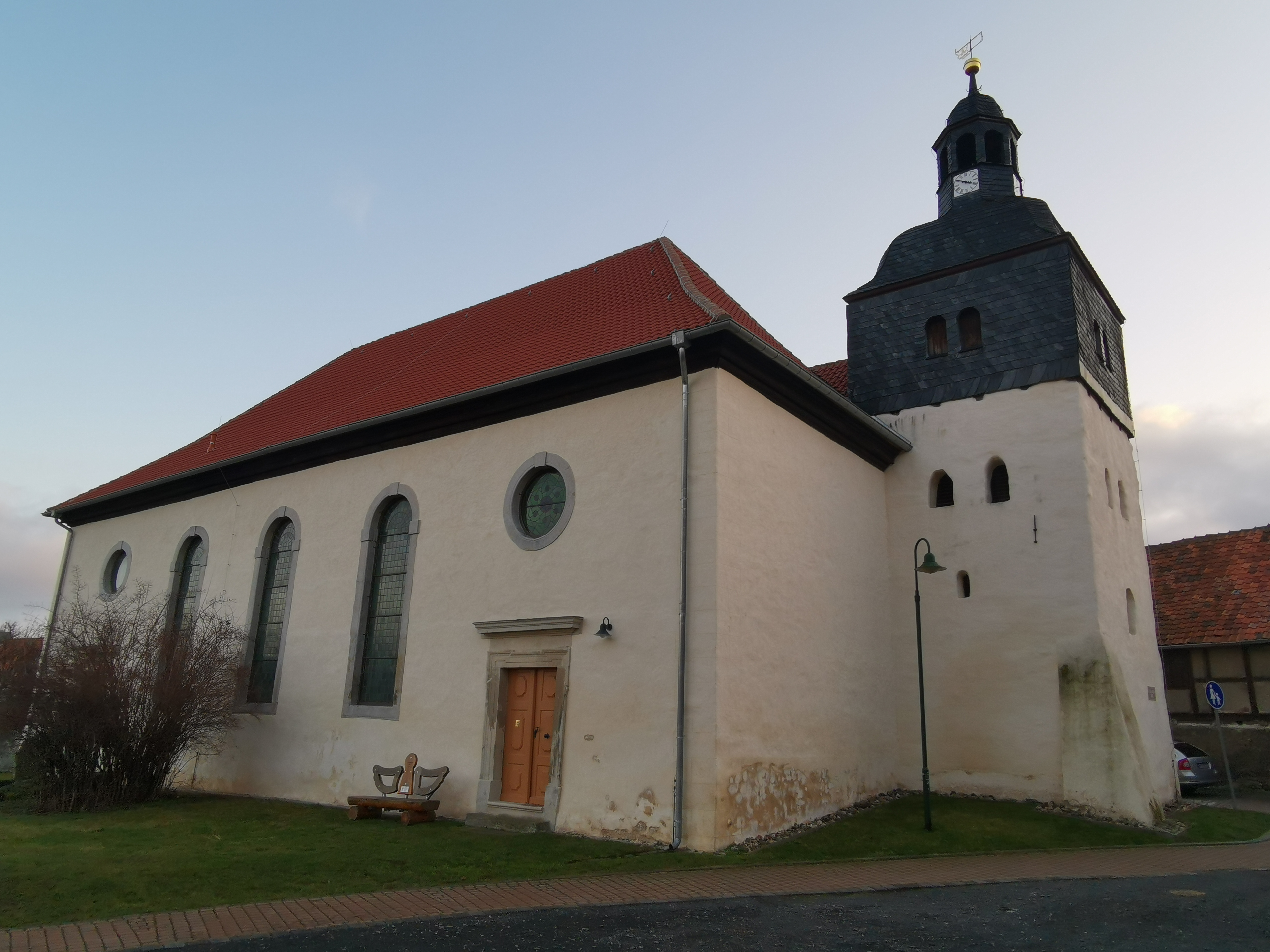 St. Lukas in Timmenrode